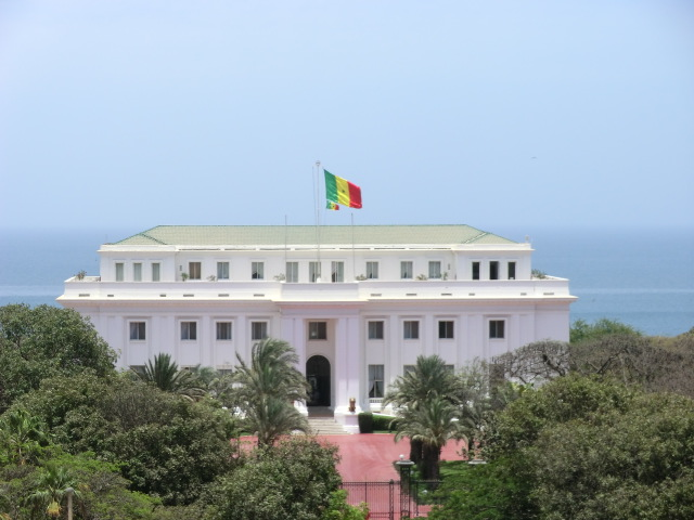 Palais présidentiel à Dakar.